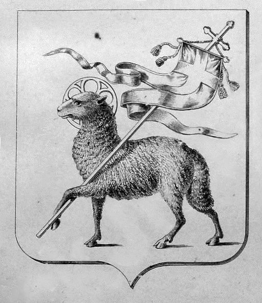 Описание герба, утвержденное в 1857 году: "Герб Болгарский: в зеленом поле серебряный идущий агнец, с червленою хоругвию, на коей крест также серебряный; древко золотое"